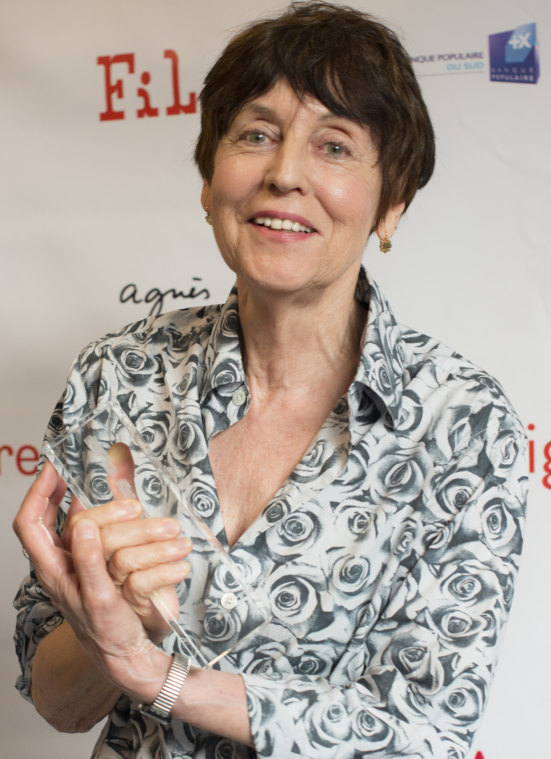 Annette Messager recevant son Prix d'Honneur lors de le 7ème édition du Festival International du Livre d'Art et du Film, le 24 juin 2017